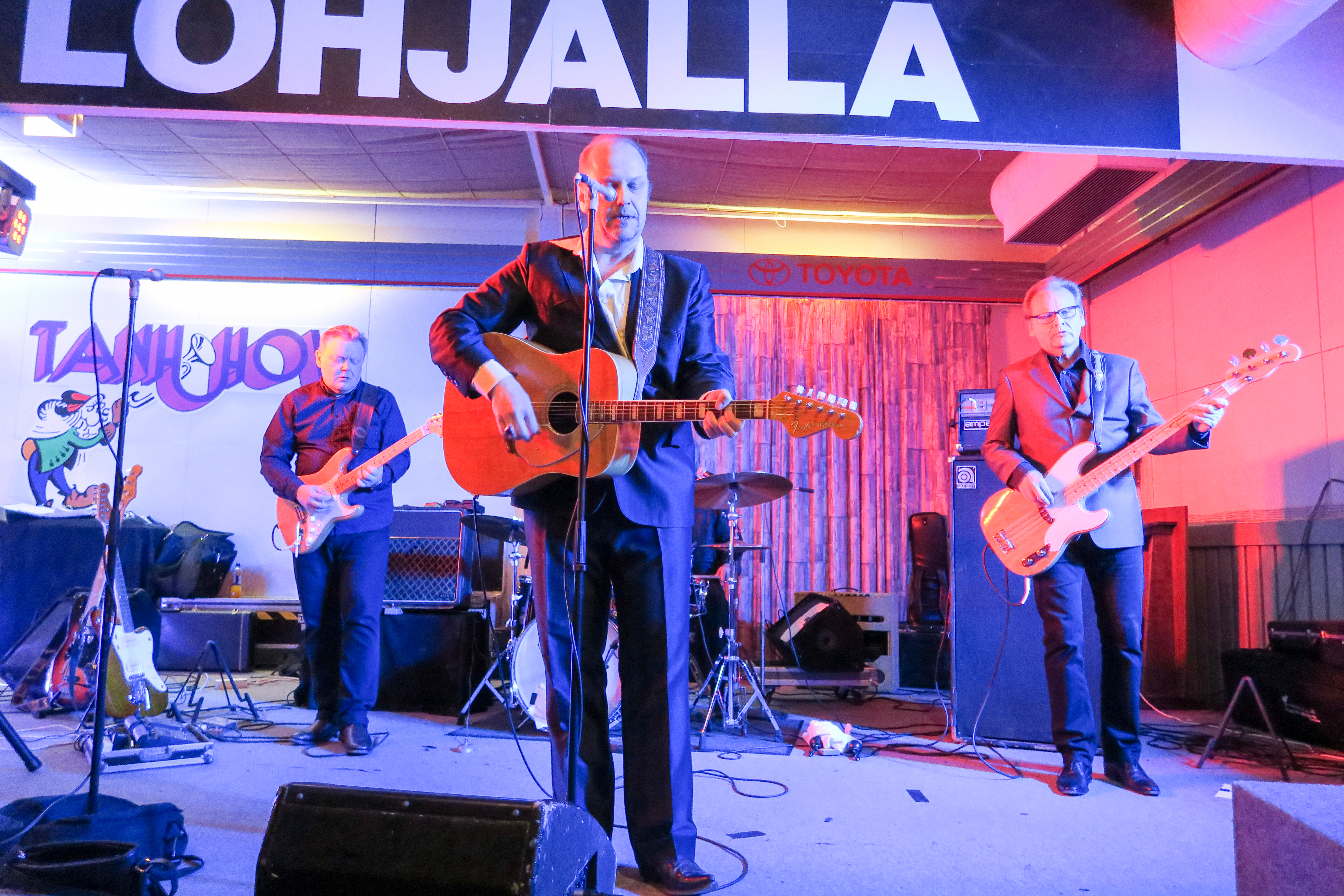 Agents yhtye